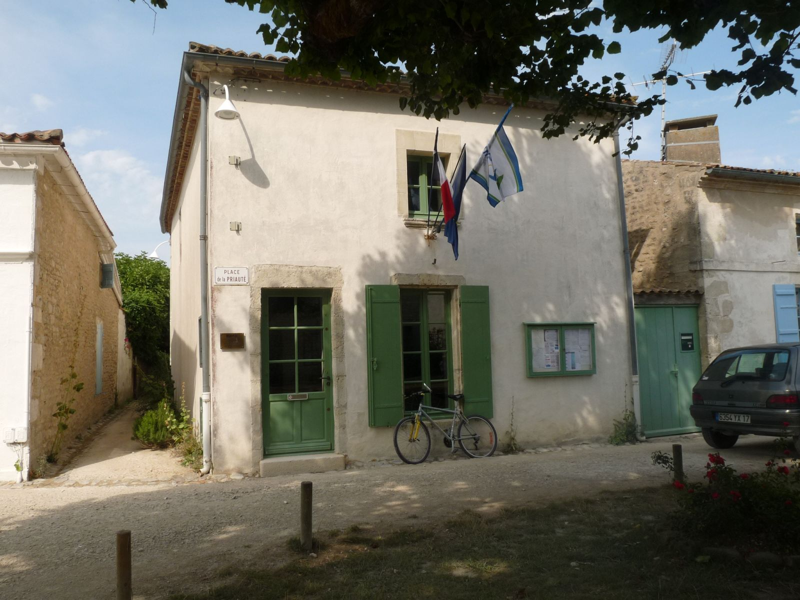 mairie de Talmont, Charente-Maritime, France